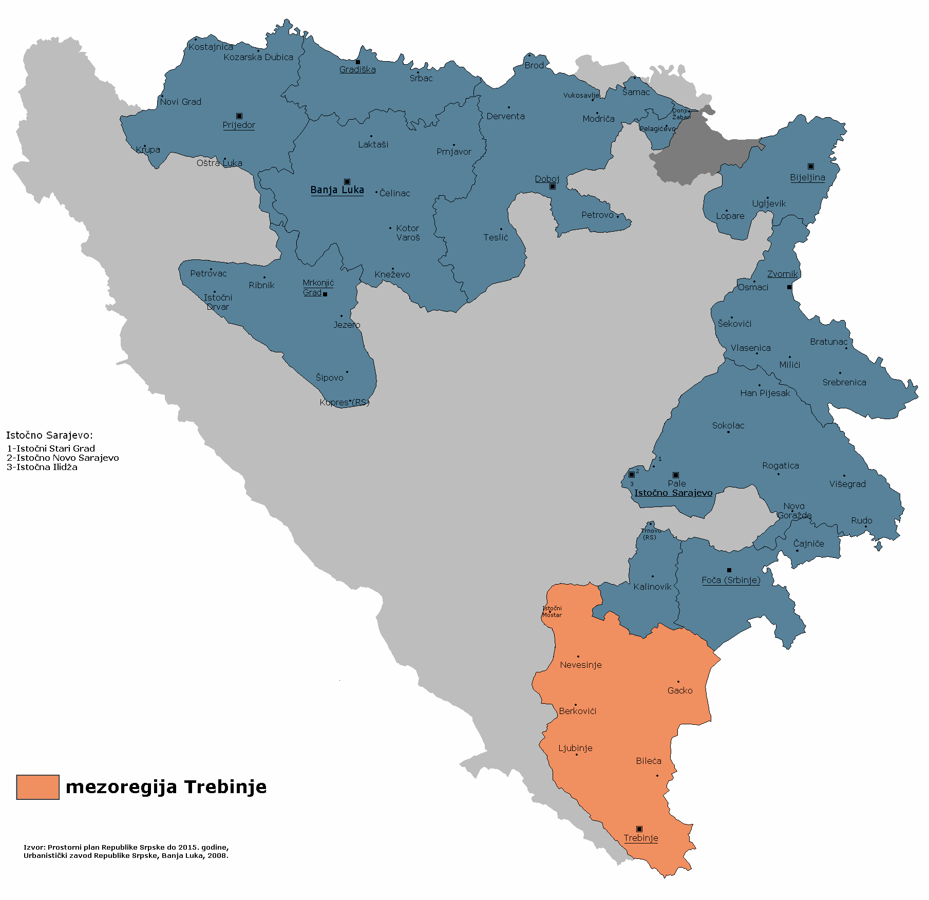 Мезорегија Требиње према Просторном плану Републике Српске